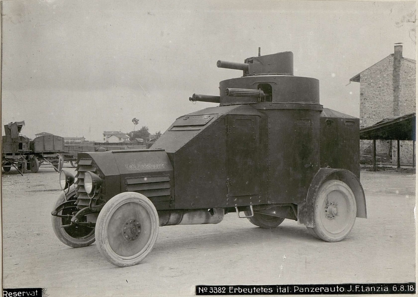 Reservat Erbeutetes ital.Panzerauto J.F.Lanzia 6.8.18.